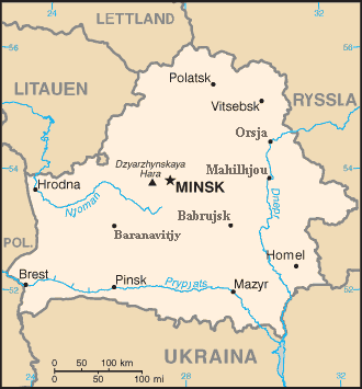 Karta över Vitryssland, translittereringen av de Vitryska namnen är hämtade från NE.se